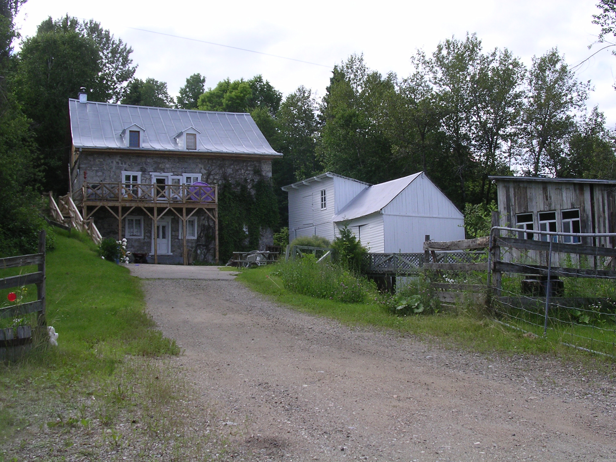 Moulin du ruisseau Michel à Baie-Saint-Paul (Québec); moulin à eau; moulin à farine